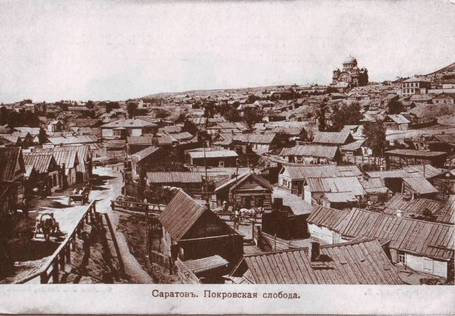 Свято-Николаевская церковь (Ново-Никольский храм) "на горах" в Саратове.